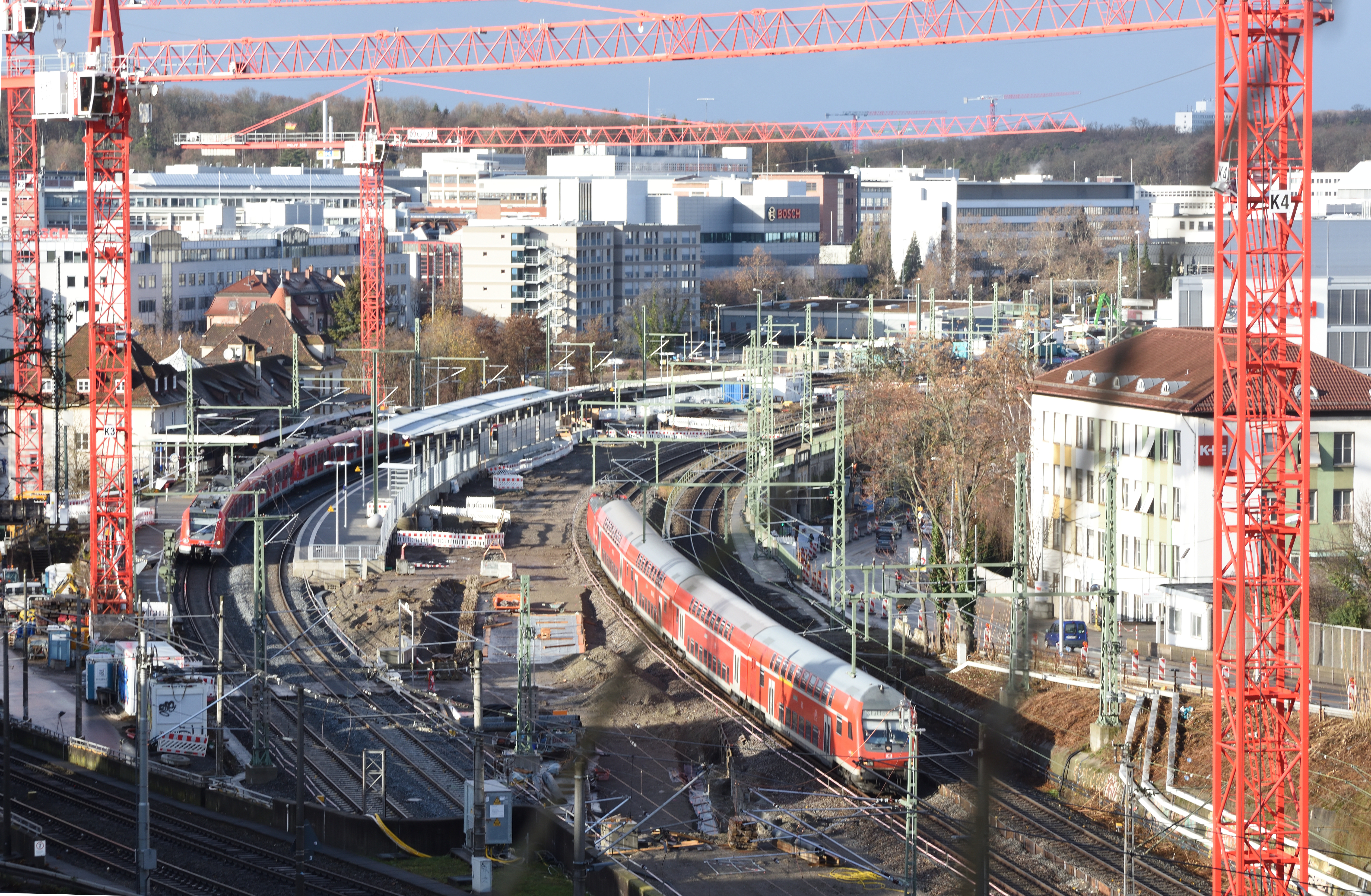 Bahnhof Feuerbach mit nördlichem Ende des Tunnels Feuerbach.